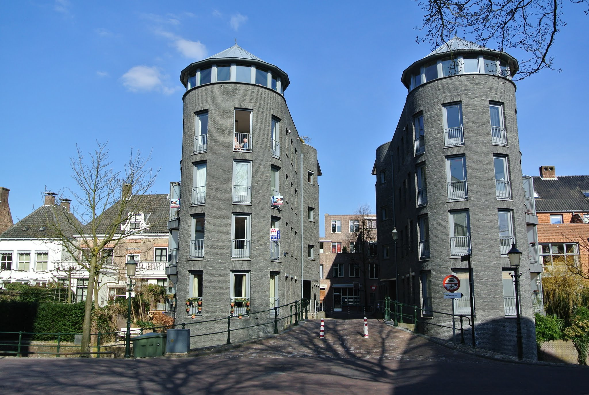 Stadhuisplein, 3811 Amersfoort, Netherlands